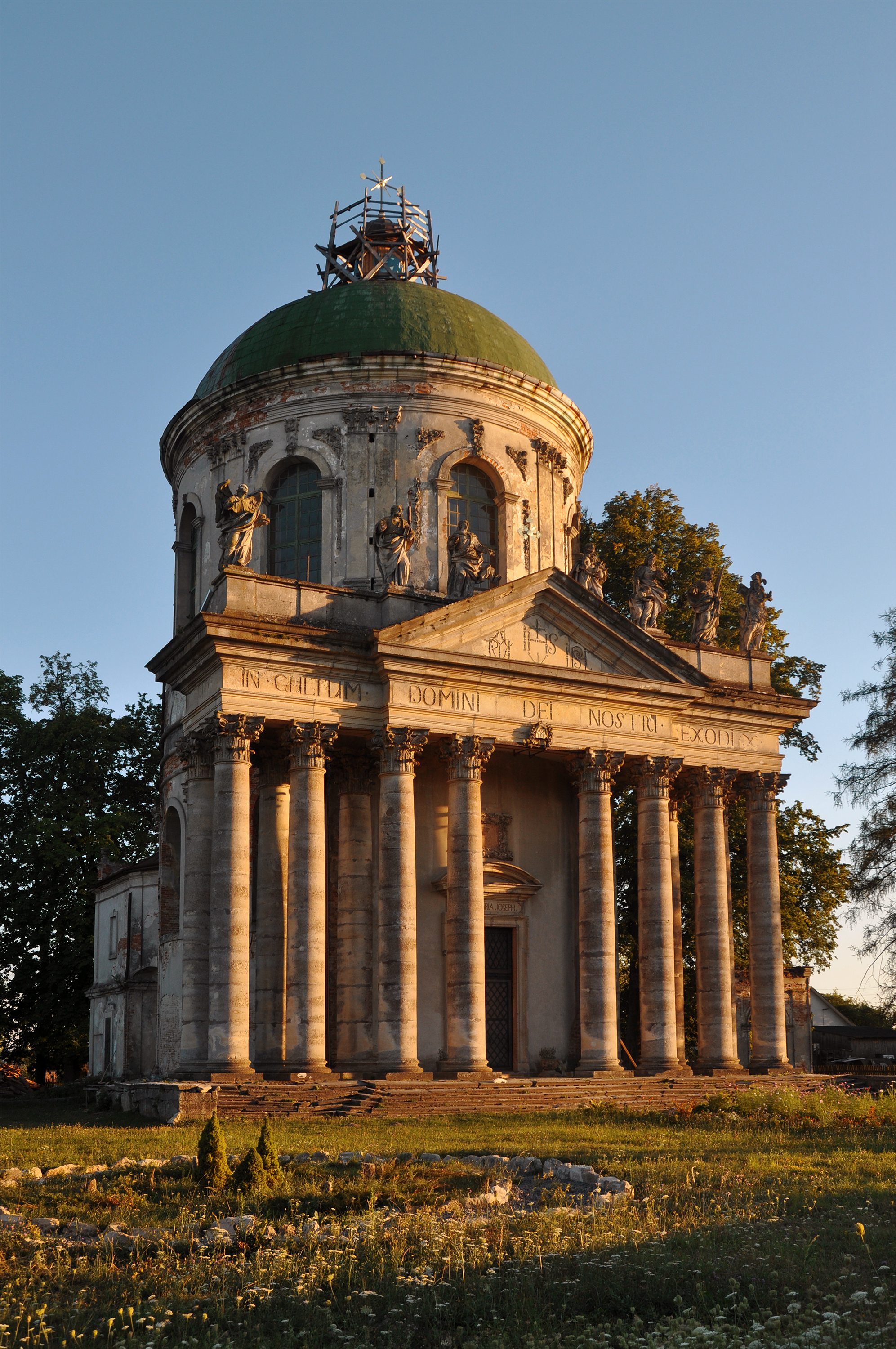 Костел Св. Йосифа (мур.), Підгірці